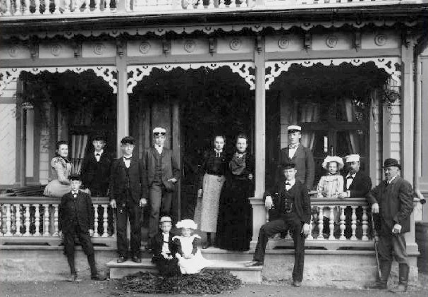 Familjen Carl Gustaf Piehl på Ekudden 1897 el. 1898. Emma Katarina Piehl saknas.